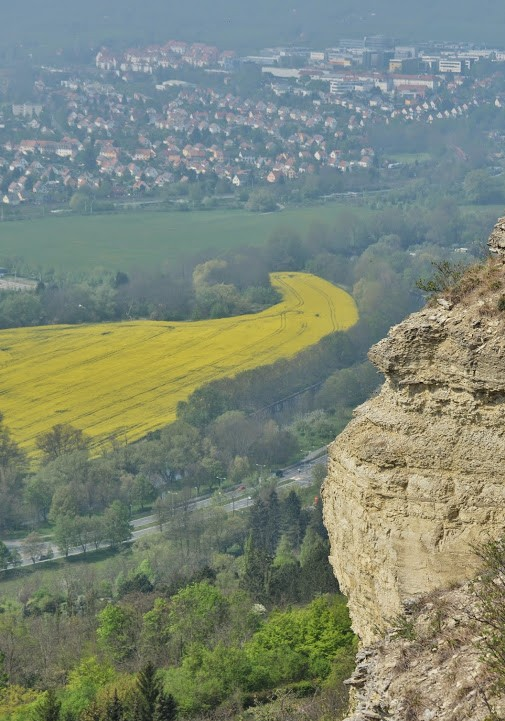 Wanderweg entlang der Muschelkalkhänge in Jena